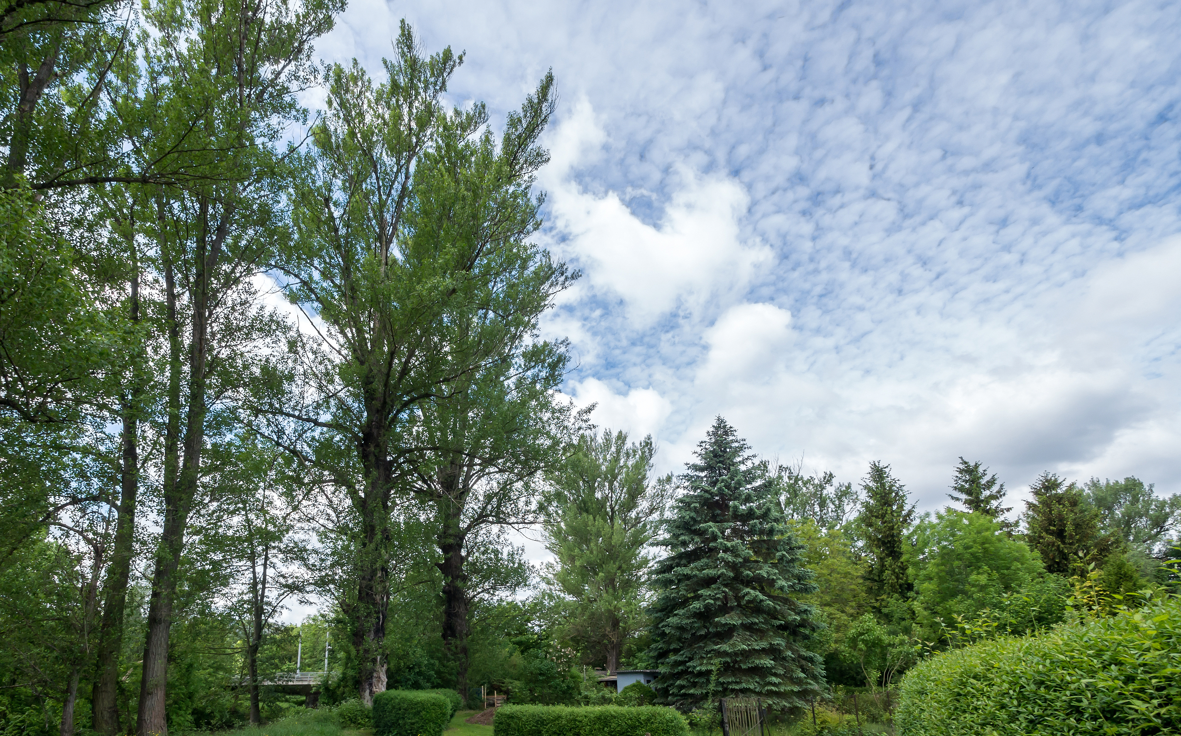 Schwarzpappeln Doc.-Nr. 1996-21 Wöllnitz V Naturdenkmal Jena